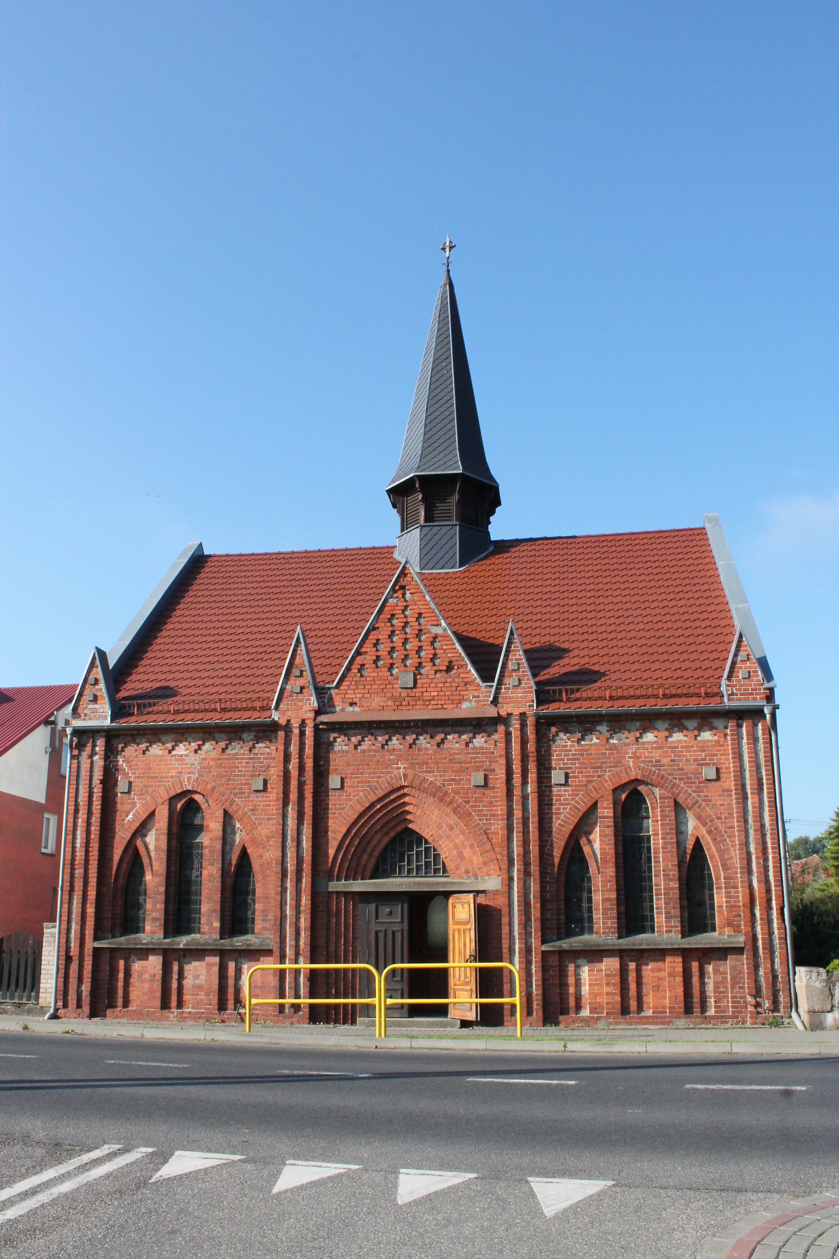 Kościół pom. p.w. Podwyższenia Krzyża Św., 1911-1912 Polanów, ul. Sławieńska 1 - powiat koszaliński